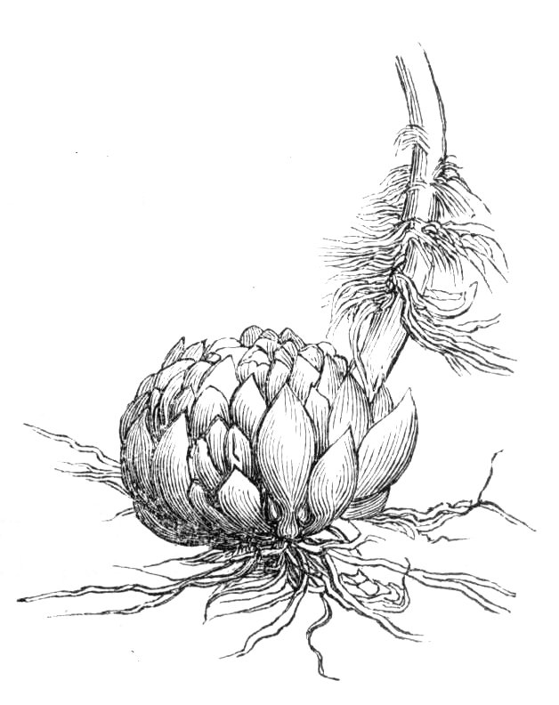 Lilium debile Bulb